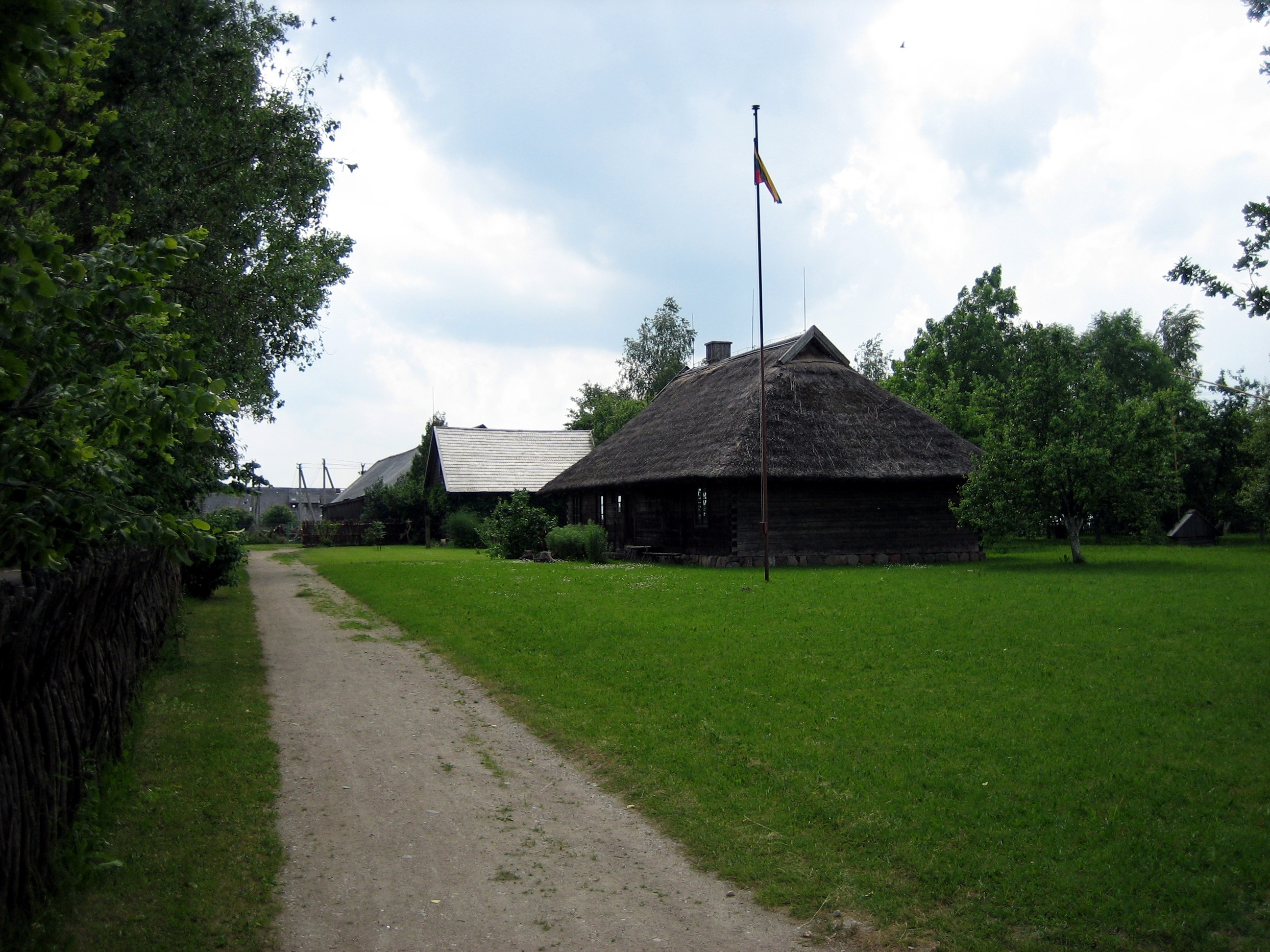 Vytogala